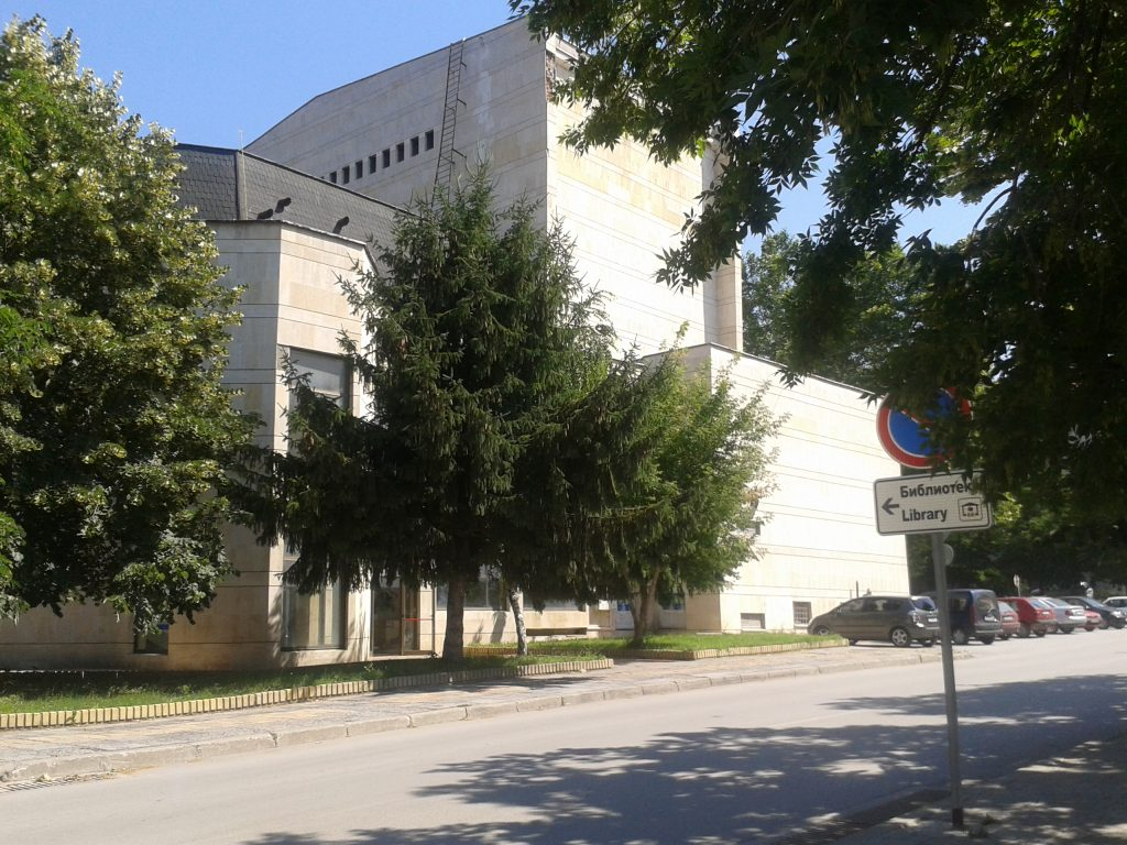 Народно читалище „Христо Ботев – 1872“